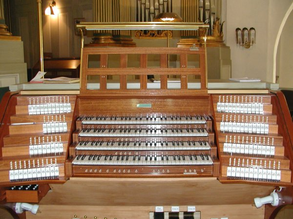 Spelbord till läktarorgeln i Norrköpings S:t Olai kyrka